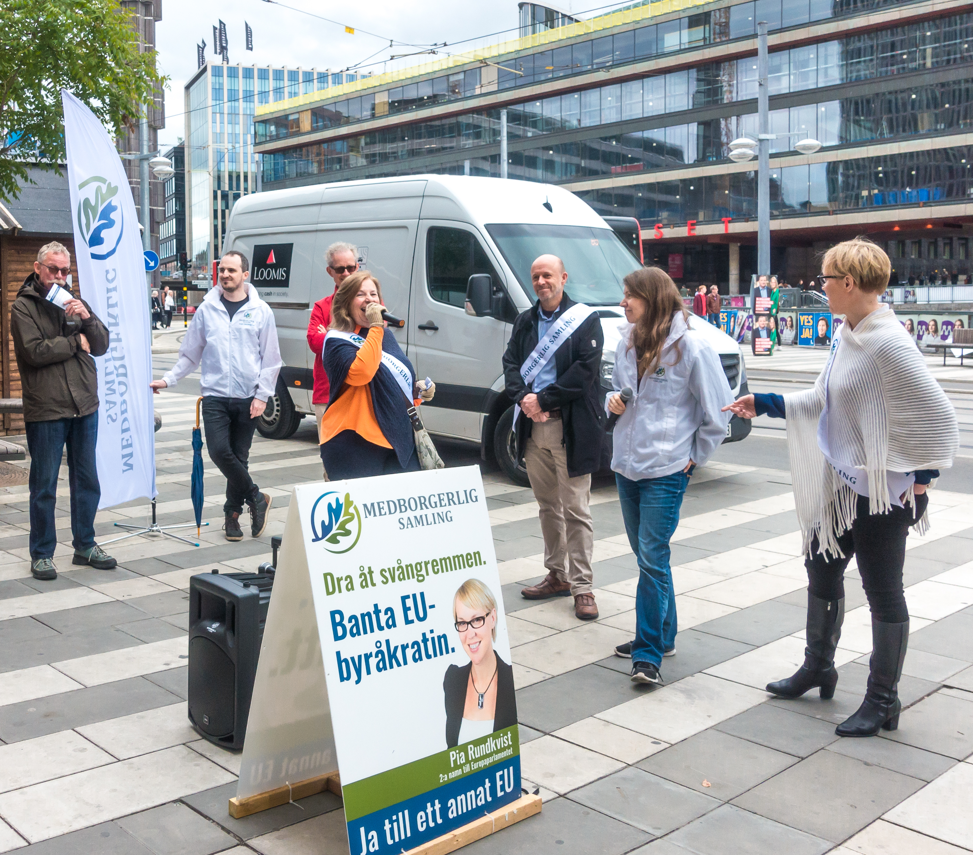 Medborgerlig samling - MED. MEDs kandidater till EU-parlamentet, Pia Rundkvist (nr 2) och Staffan Gunnarson (nr 3) samt MEDs talesperson i demokratifrågor Josefin Utas. Mötet modererades av Lena Malmberg, från MEDs styrelse, distrikt Stockholm.